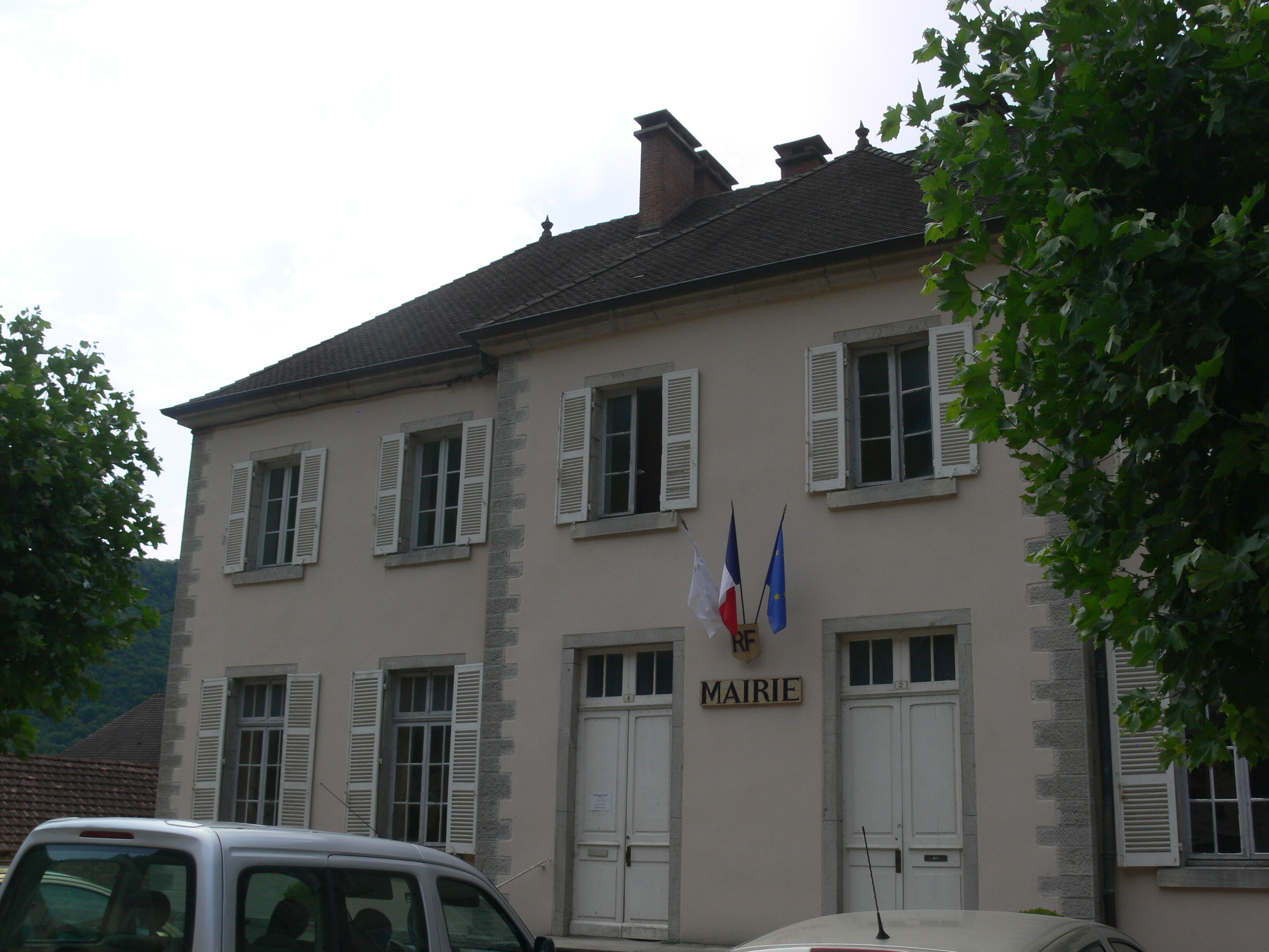 Mairie de Baume-les-Messieurs (Jura, France).